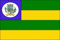 Bandeira do município goiano Caiapônia